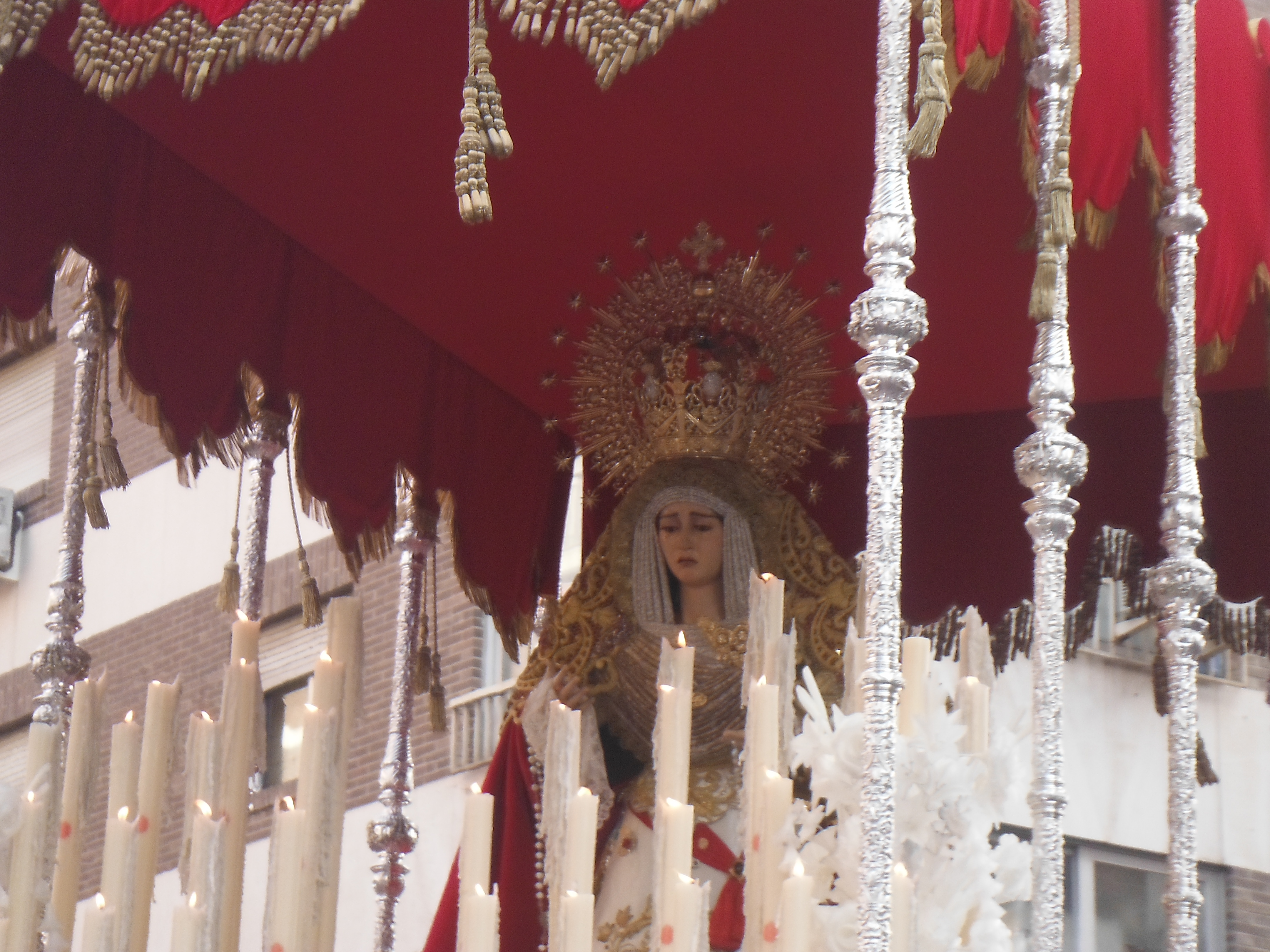 M. S. de la Caridad durante su salida Granada 2014